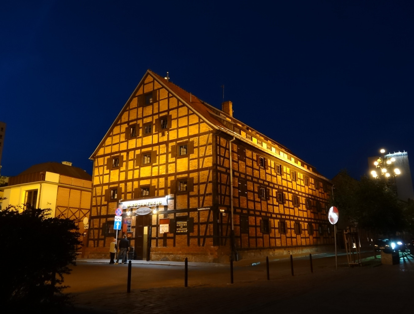 Spichlerz nad Brdą w Bydgoszczy przy ul. Stary Port zbud. w latach 30. XIX wieku